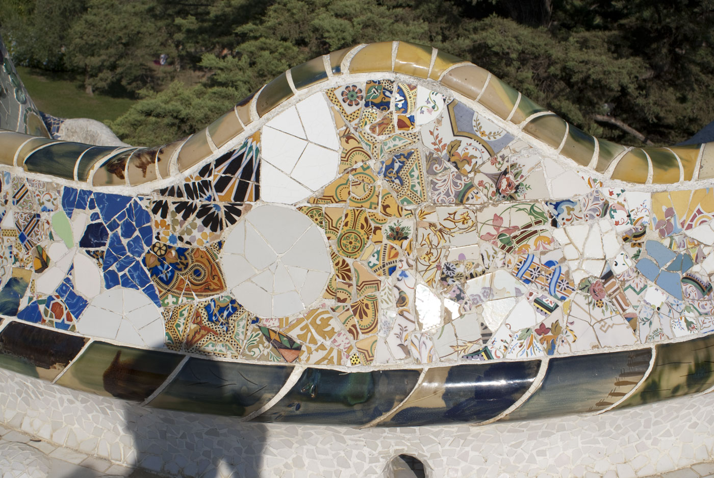 Gaudi. Parc Güell. Mur couvert de "trencadis"